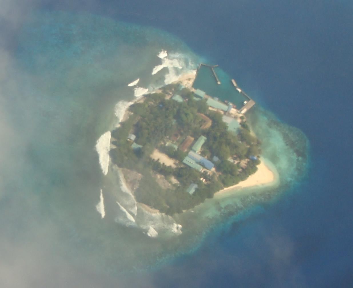 Kanduoih-giri Island